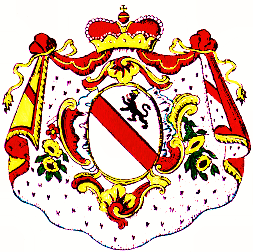 Wappen der Marquis de Chasteler, Werk aus dem 18. Jahrhundert